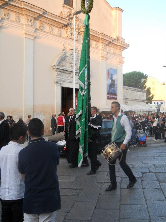 bandiera gremio degli ortolani, Sassari